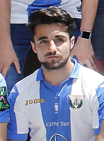 Felicidades pepineros!! Vuestro ascenso a Primera es la historia de un sueño, el resultado de vuestro trabajo y esfuerzo. Sois un orgullo para todo Madrid! Enhorabuena CD Leganés. #LeganésEsDePrimera